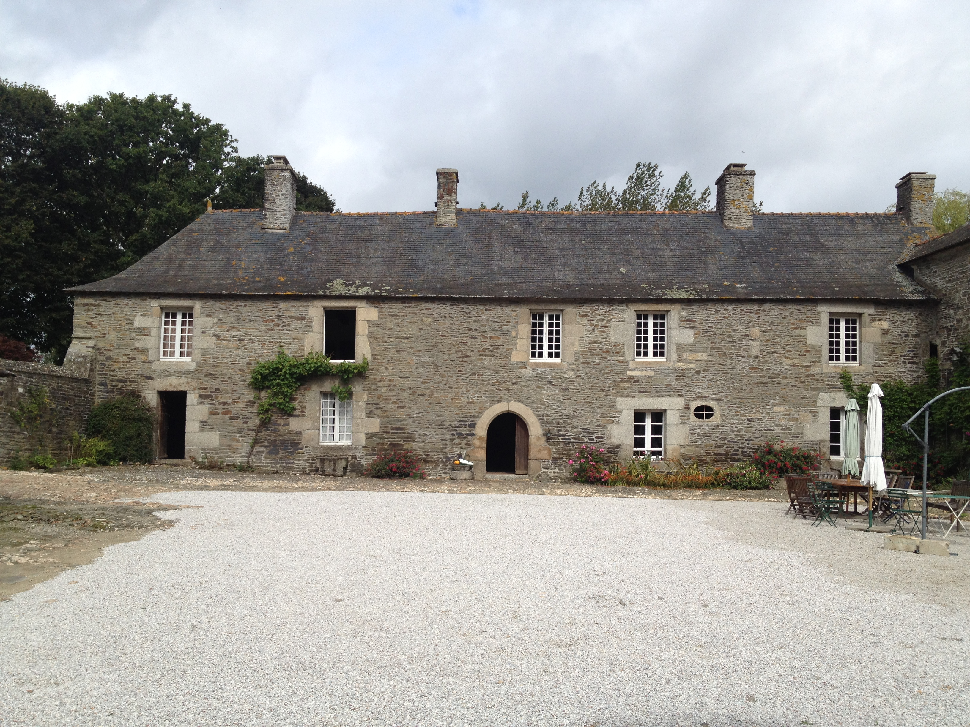 Manoir de Kerborgne